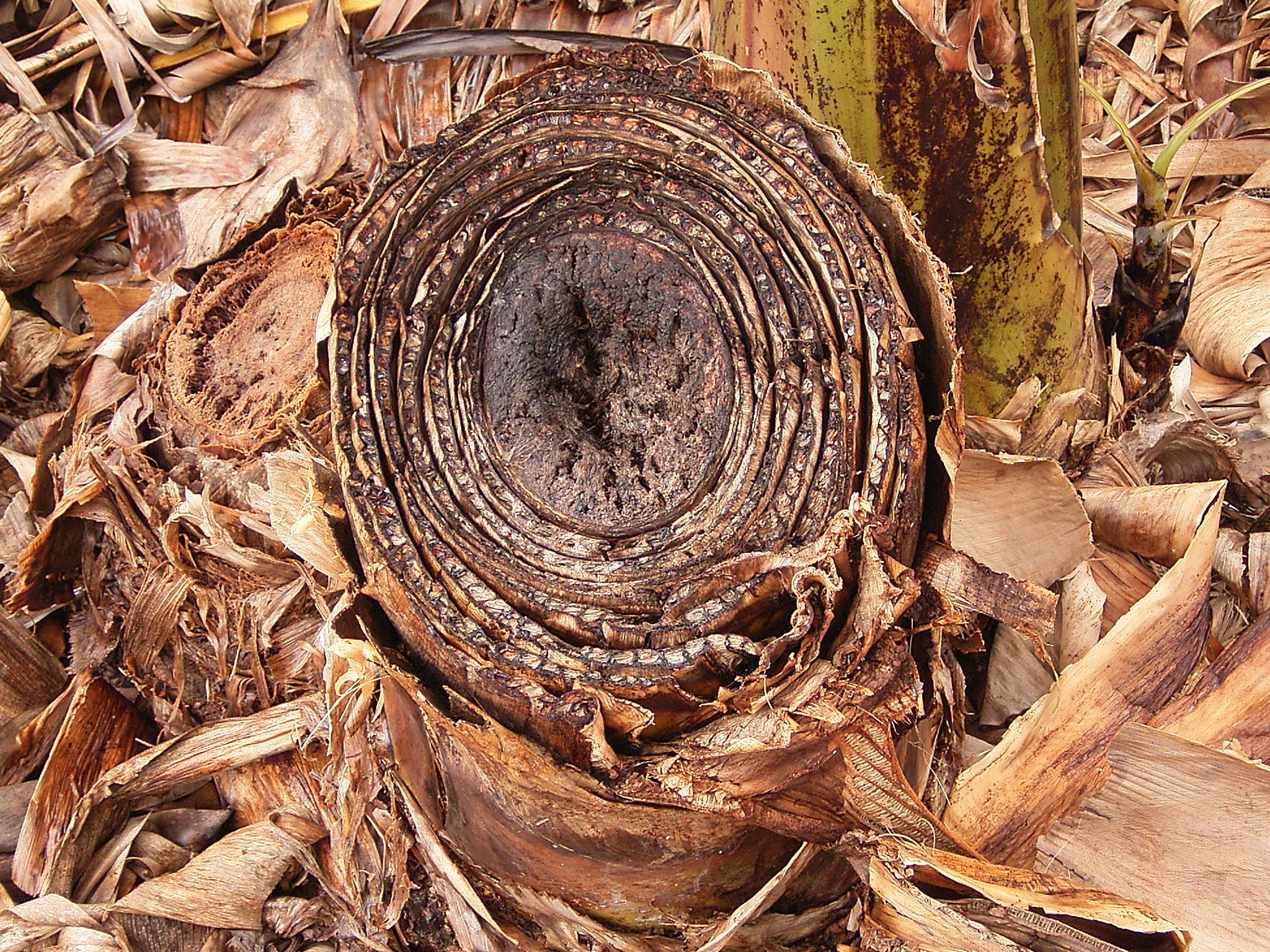 Banana plantation in La Cuesta, San Andrés y Sauces, La Palma, Canary Islands